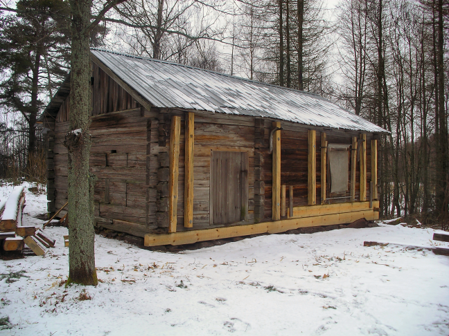 Gamla Hinkaböle Pyttis restaureringsarbete 2008 (Pyhtää)